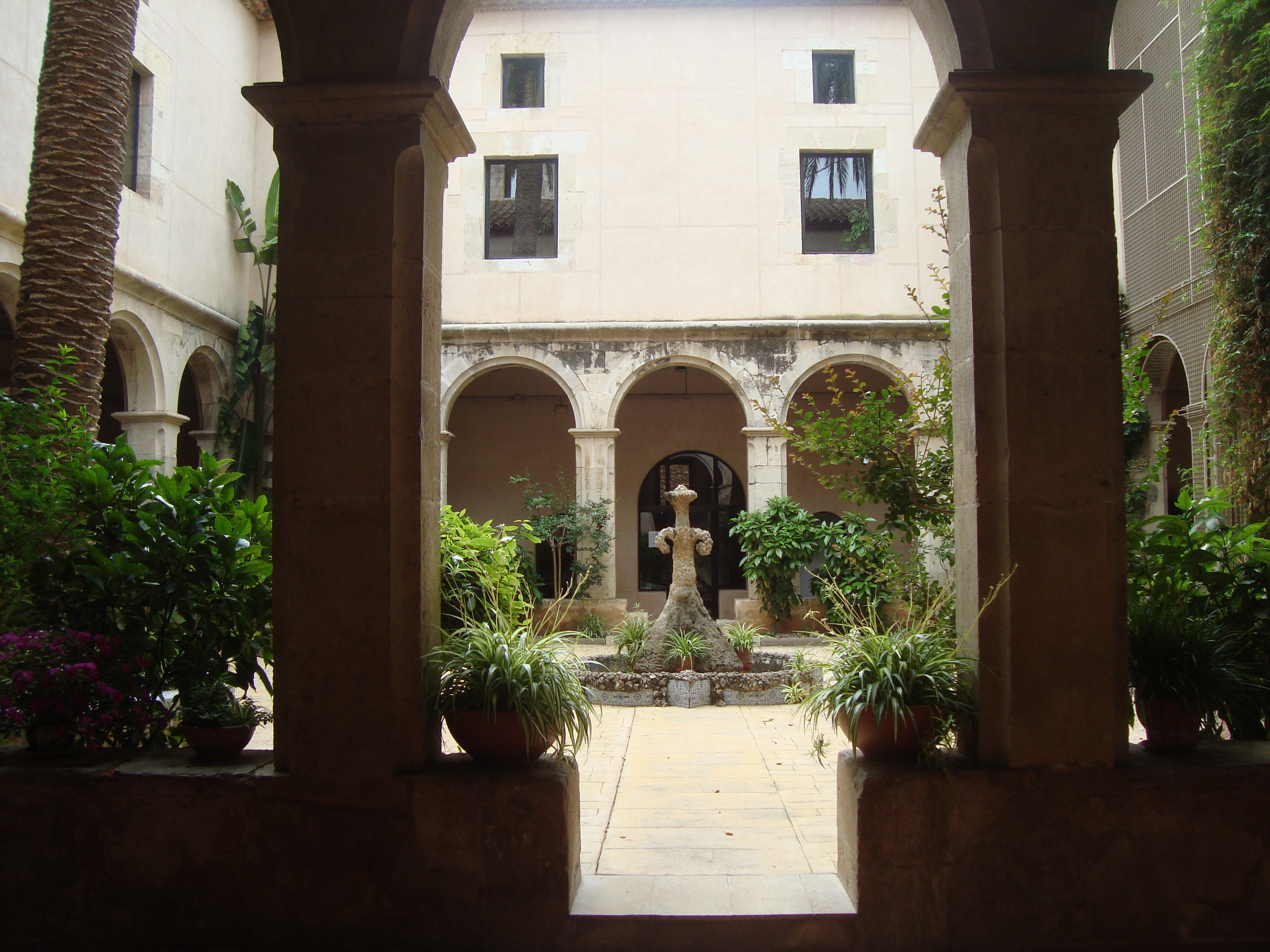 Casa de la Vila (Ulldecona)